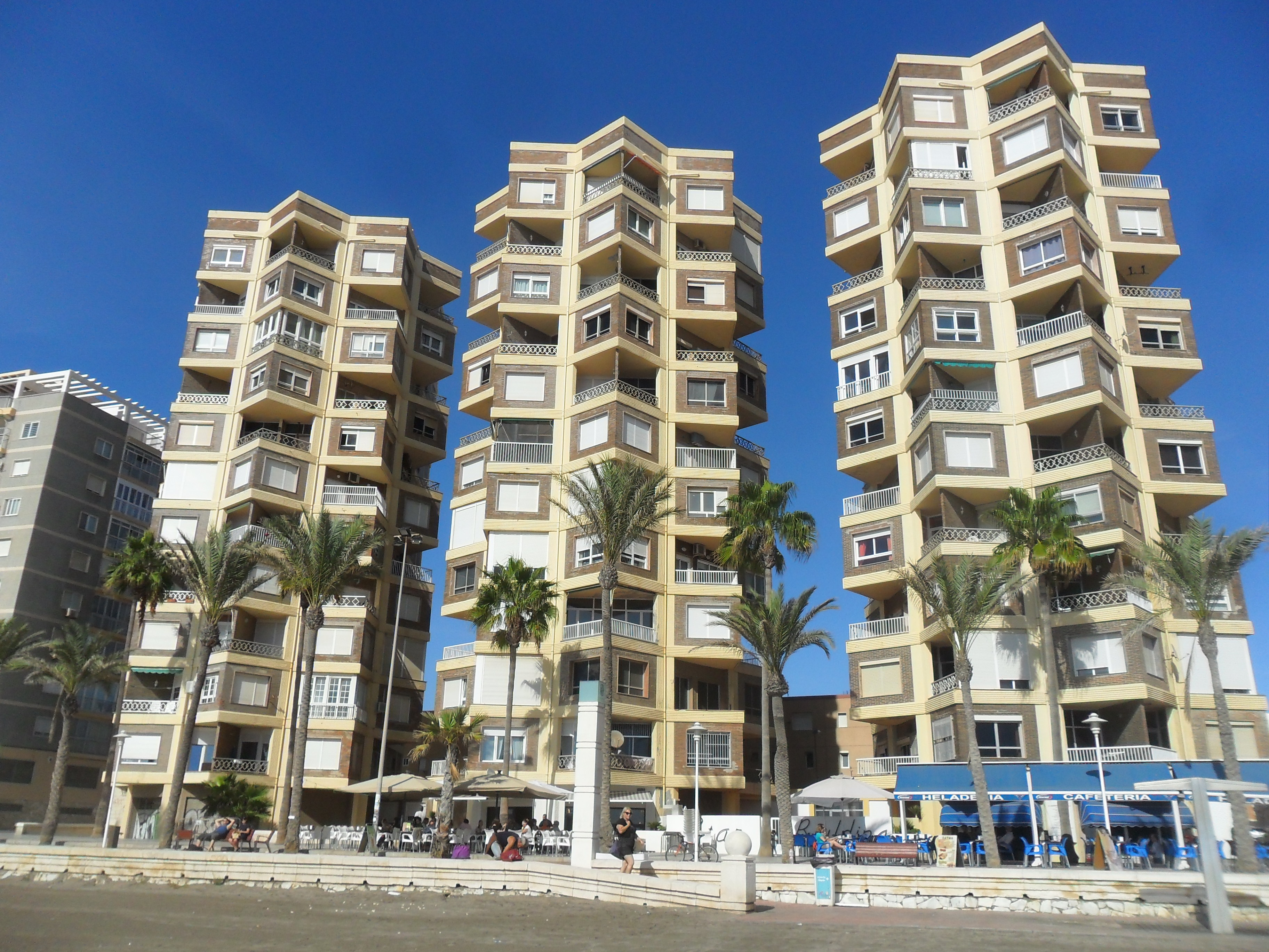 Star Building desde la orilla de la playa